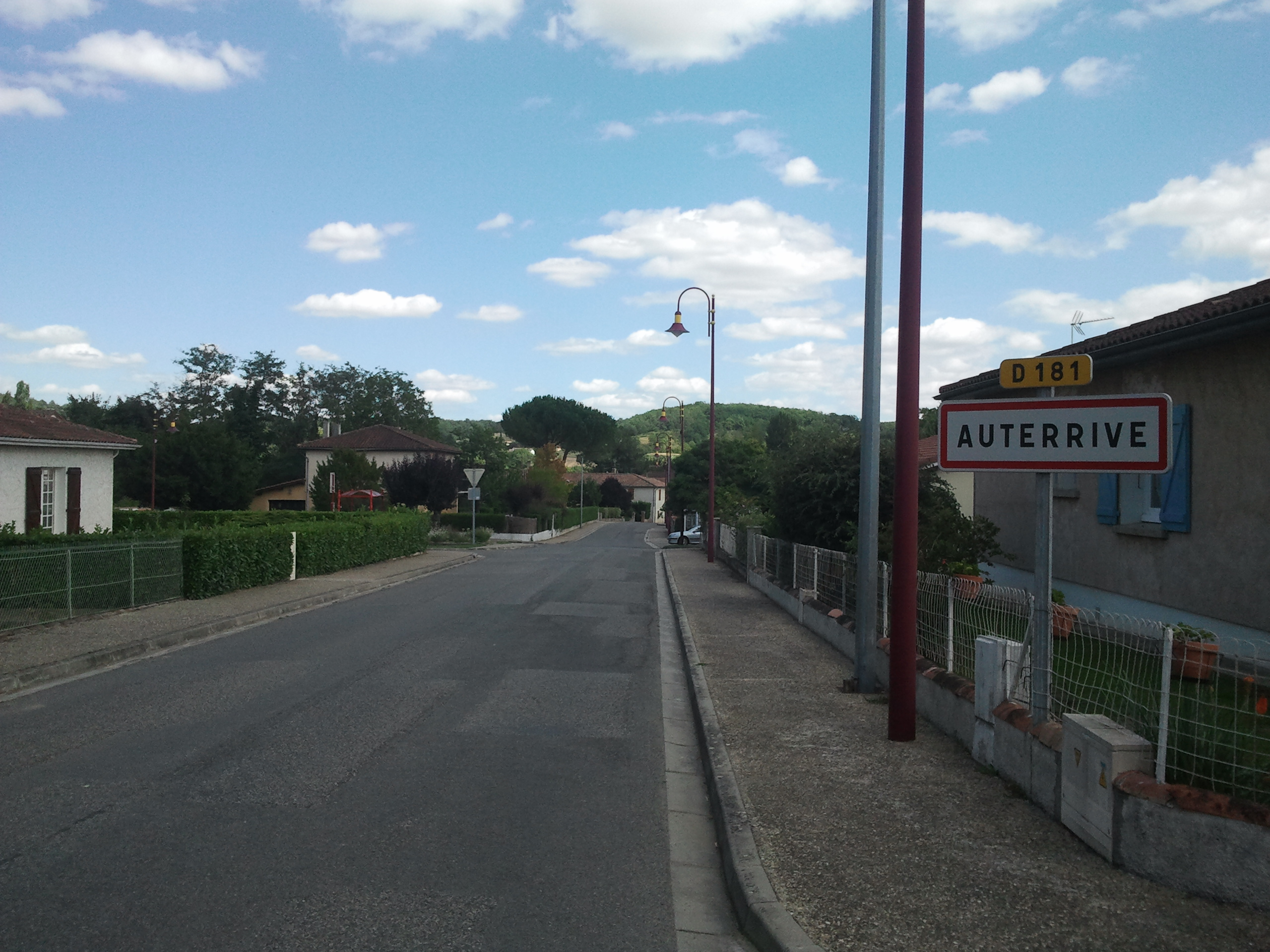 Entrée d'Auterrive sur la D181 avec un panneau montrant l'orthographe revendiquée par la commune